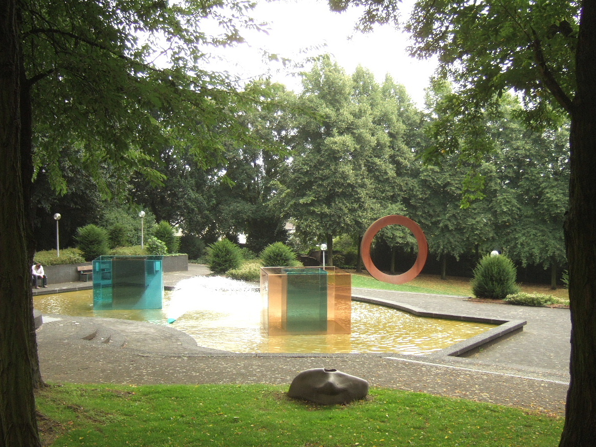 Skulpturengarten Museum Abteiberg in Mönchengladbach - Larry Bell: „Arolsen-Piece“ (1992) (Bildmitte)/ Mauro Staccioli: „Anello“ (2001) (rechts)/ Jorge Pardo: „Garbage Can“ (1999) (vorne)